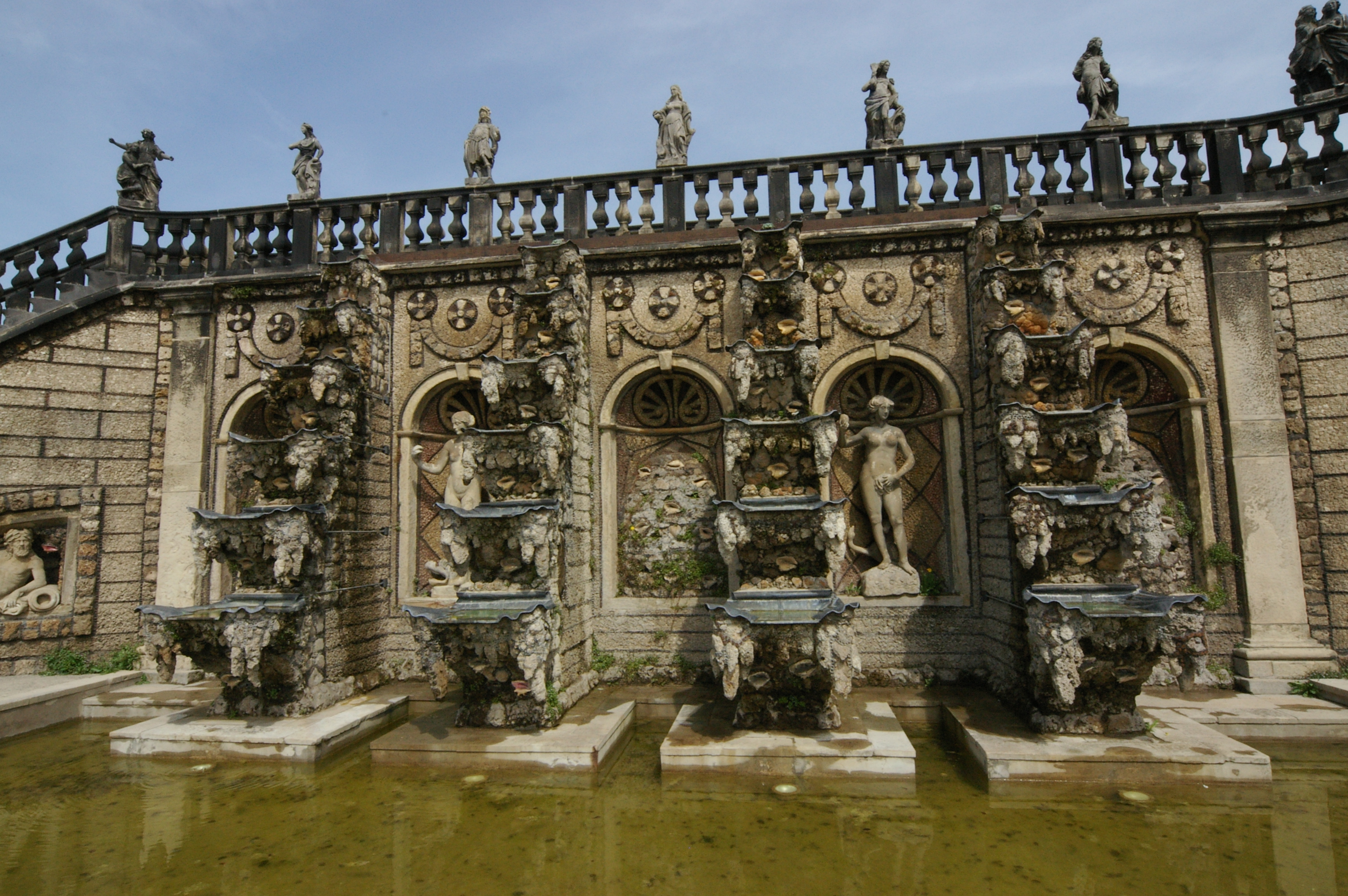 Hannover - Herrenhausen - Großer Garten - Kaskade. 2005-05-02